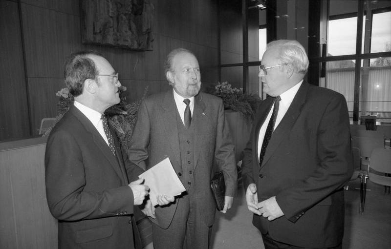 18.12.1989 Festakt anläßlich des Amtswechsel im Bundesverfassungsgericht Karlsruhe. - Amtseinführung von Helga Seibert (Amtszeit ab 10.11.89), und Dr. Jürgen Kühling (ab 12.7.89, beide I. Senat), sowie Klaus Winter (ab 10.11.89, II. Senat). - Verabschiedung der Richter am Bundesverfassungsgericht Prof. Dr. Hermann Heußner (Amtszeit bis 15.6.89) und Dr. Gisela Niemeyer (bis 2.11.89), beide I. Senat, sowie Ernst Träger (bis 2.11.89, II. Senat), denen Bundesverfassungsgericht-Präsident Dr. Roman Herzog das Große Verdienstkreuz mit Stern und Schulterband des Verdienstordens der Bundesrepublik Deutschland aushändigt.